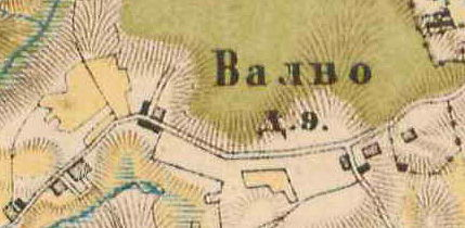 План деревни Скотное. 1885 г.